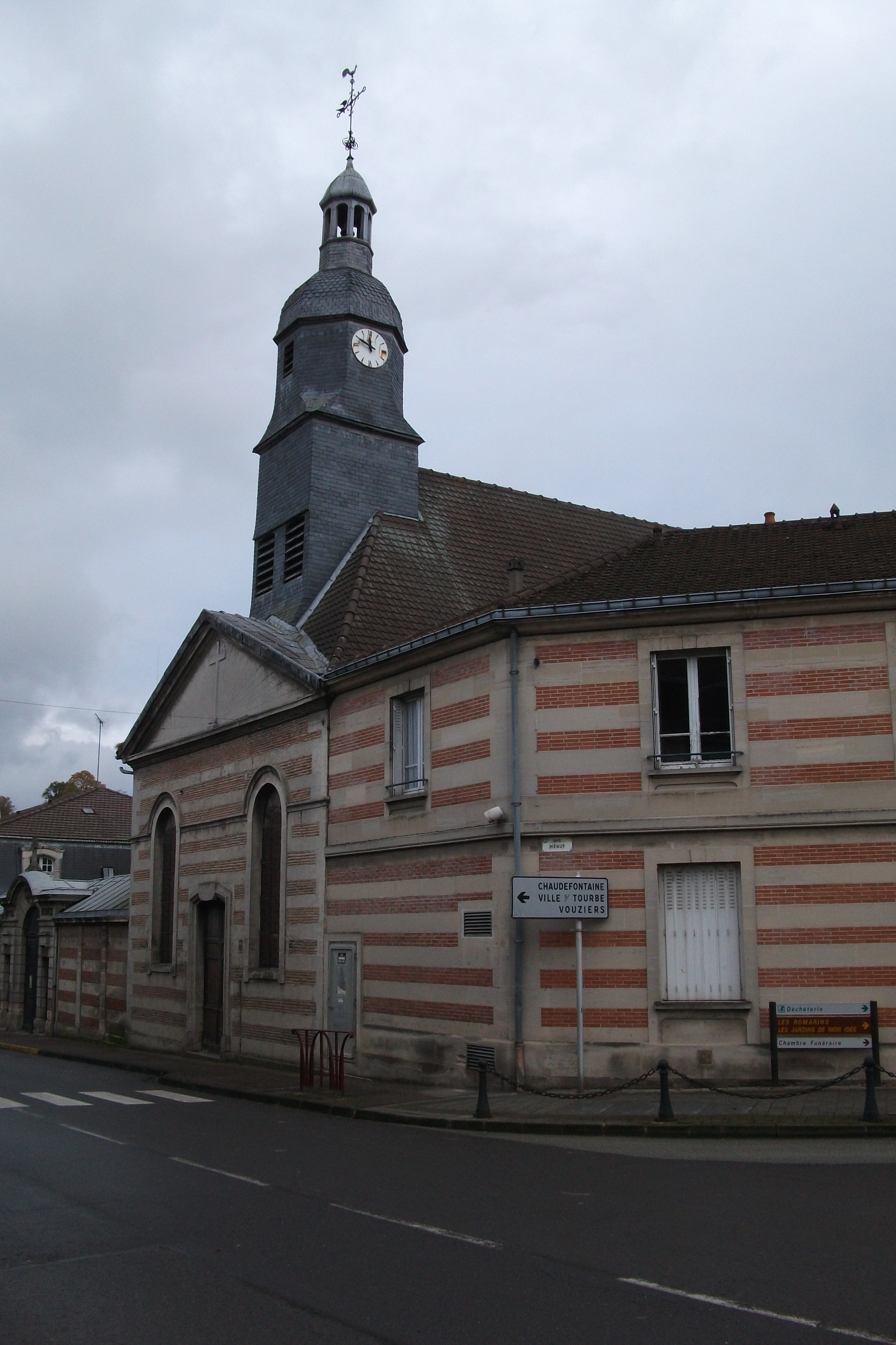 hospice et chapelle de Sainte-Ménehould.